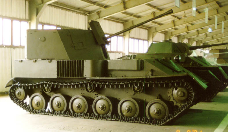 ЗСУ-37 в Кубинке